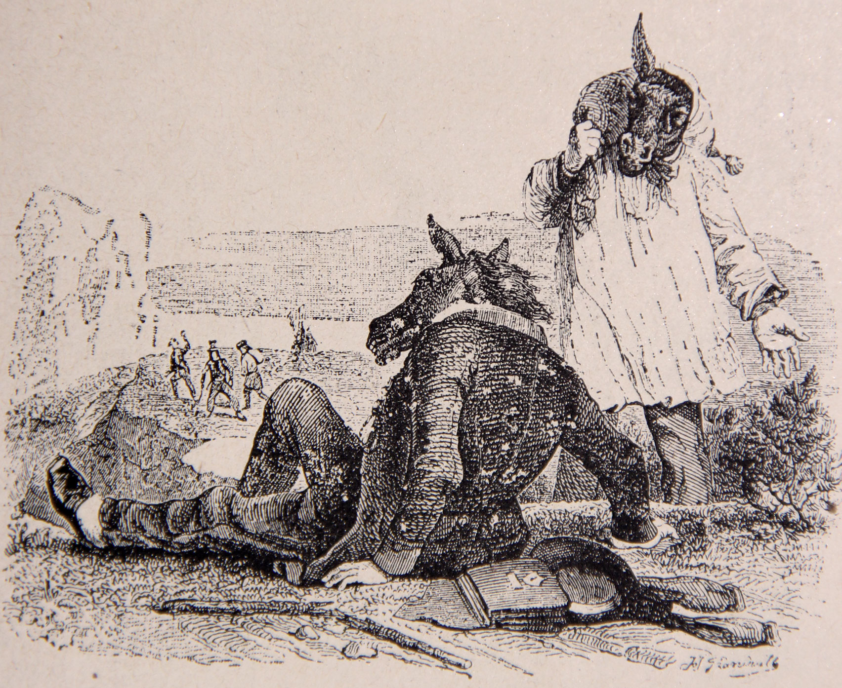 Illustrations des Fables de La Fontaine.